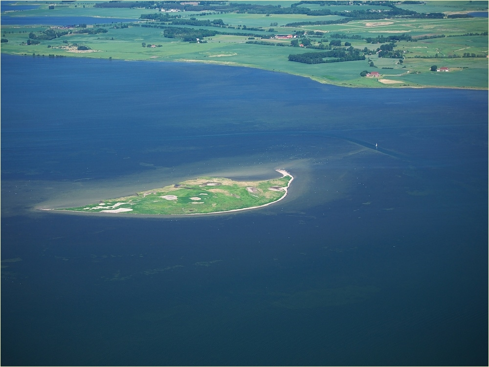 Ostseeinsel Heuwiese